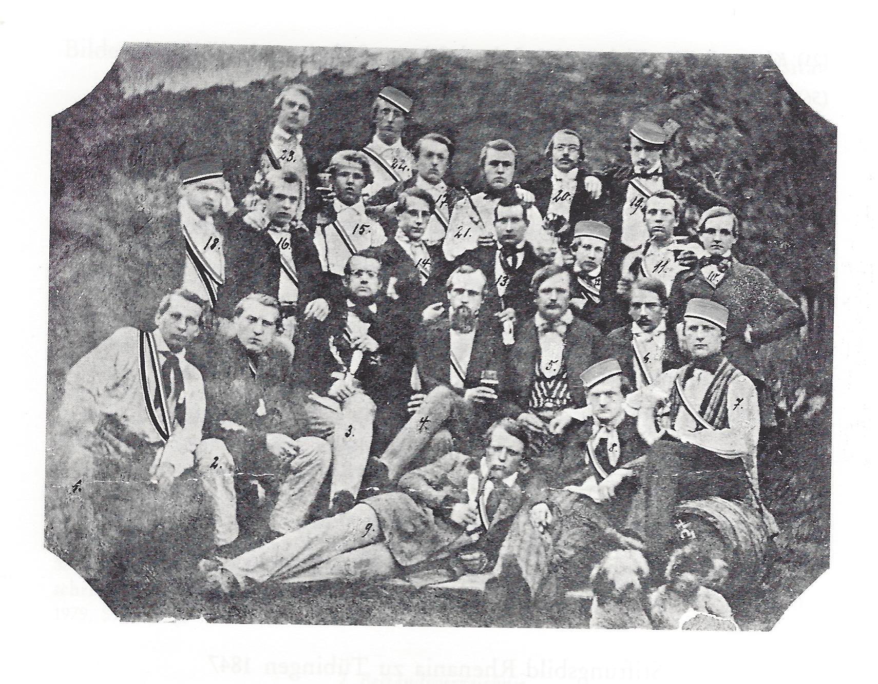 Daguerrotypie von der Stiftung des Corps Rhenania Tübingen. Beschreibung und Entstehungsbericht bei Rainer Assmann: Einst und Jetzt, Jahrbuch des Vereins für corpsstudentische Geschichtsforschung, Bd. 30 (1985), S. 201-203.